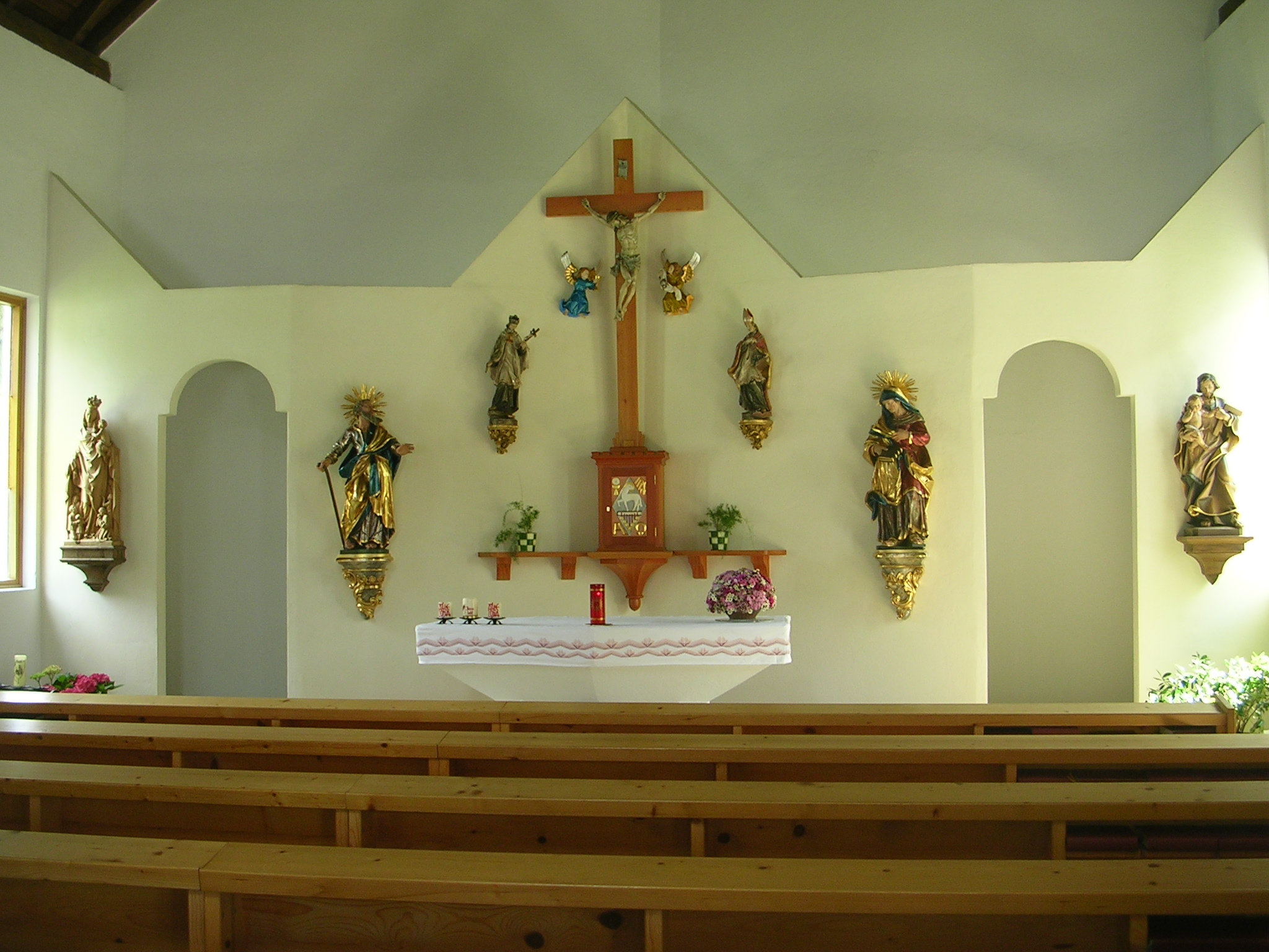 Innenansicht der Kirche von Lesach (Fraktion der Gemeinde Kals am Großglockner).